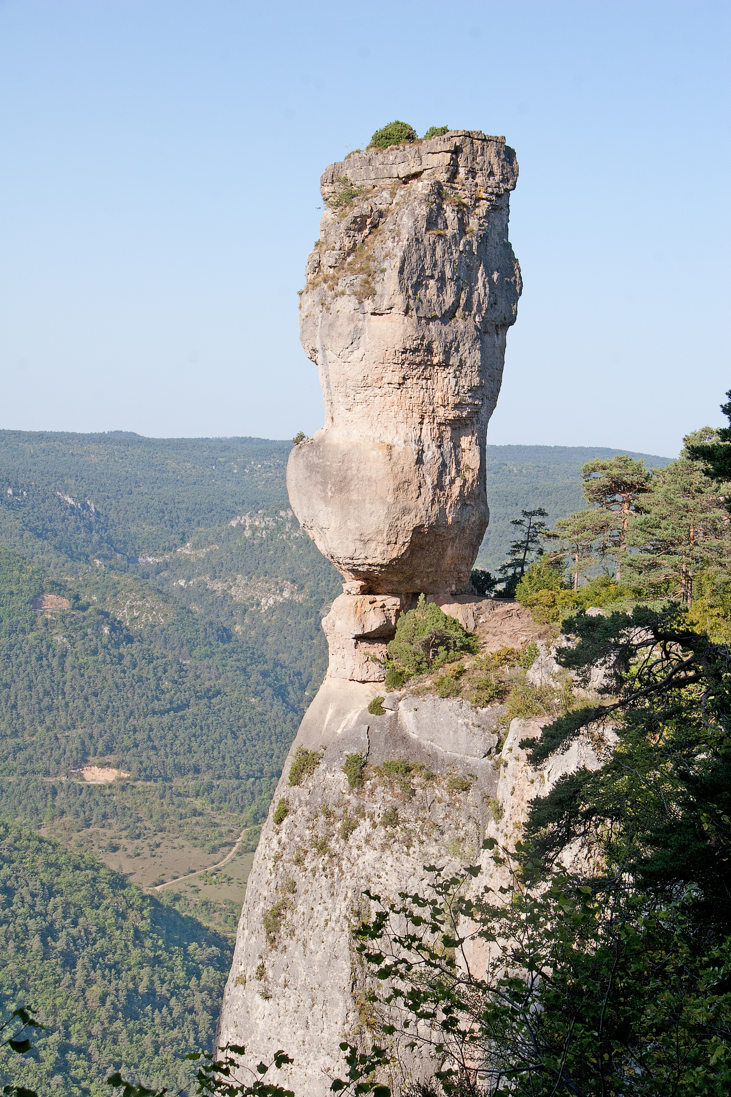 La Vase de Sevres